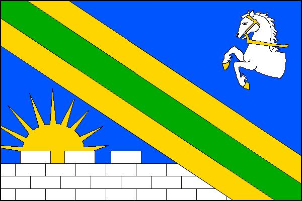 Vlajka obce Raná (okres Chrudim)